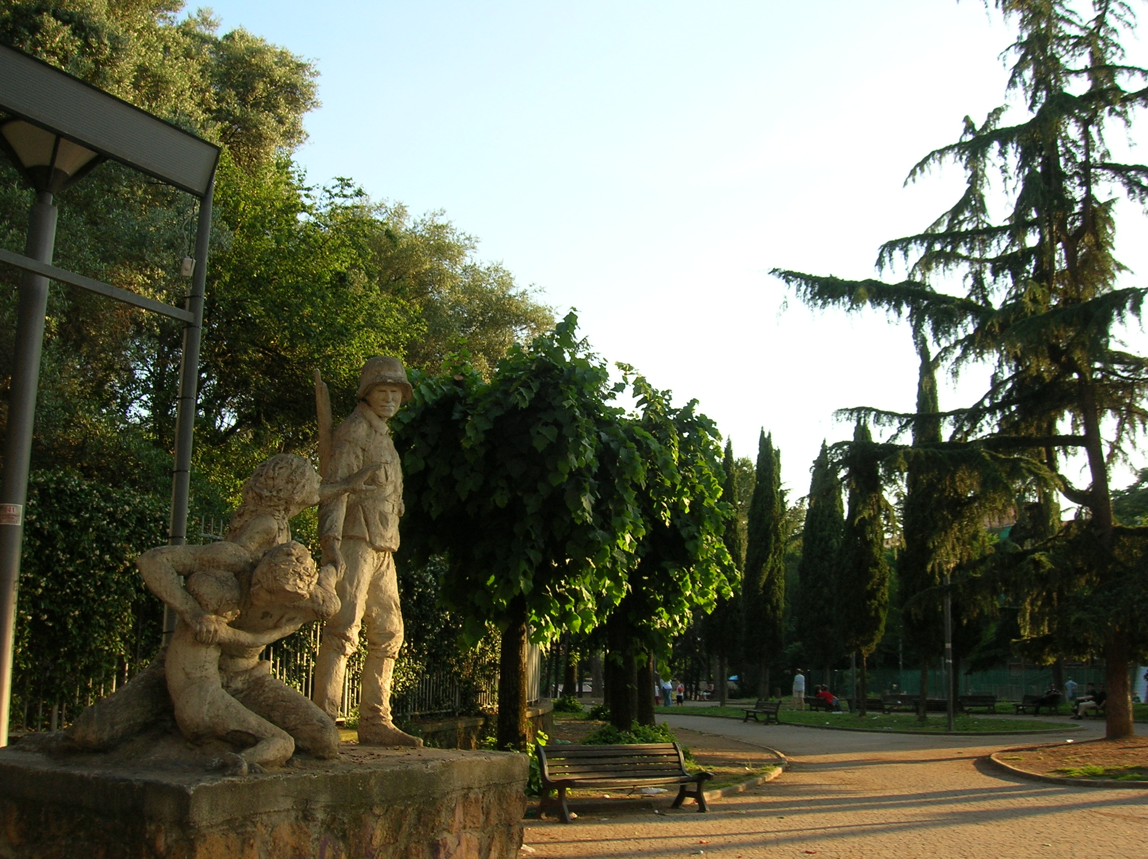 Monumento ai caduti del XVII Aprile 1944, XVII Aprile 1944 park, Quadraro (Roma)